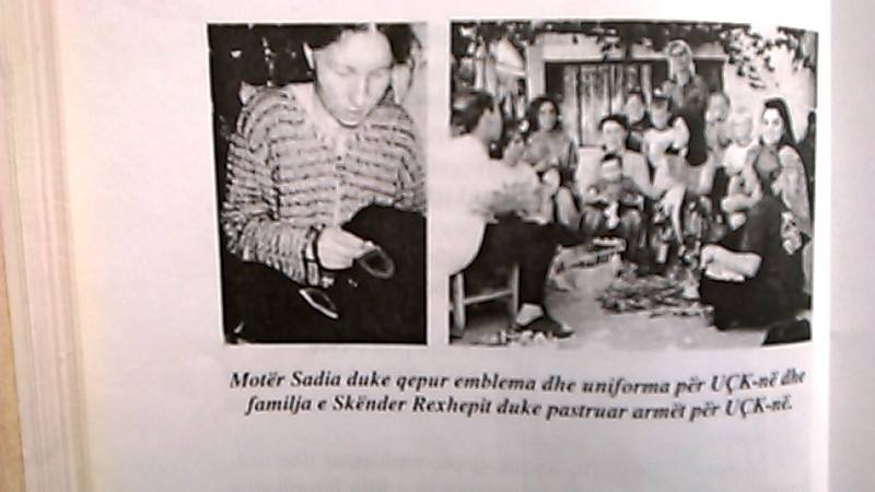 Sadija dhe Flamurja duke qepur emblemt e UCK-se